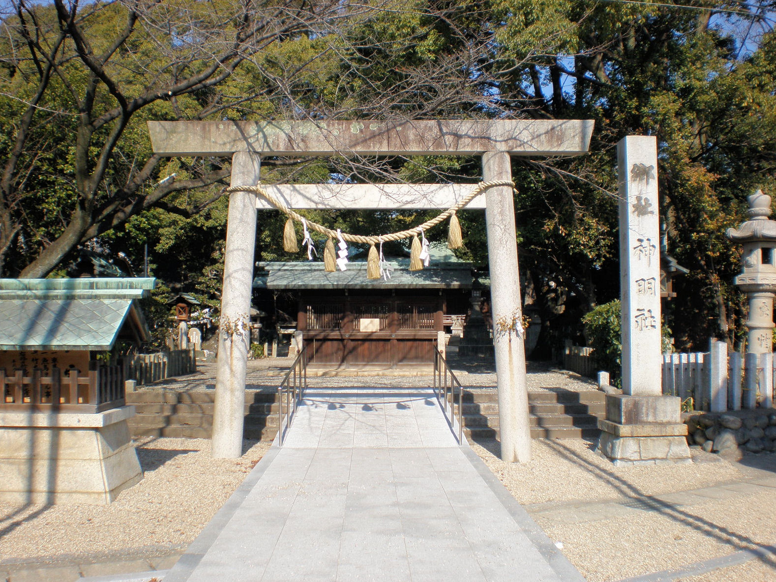 愛知県小牧市にある小牧神明社の鳥居